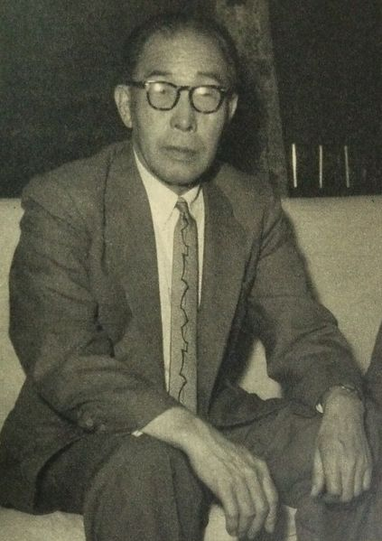 大浜信泉